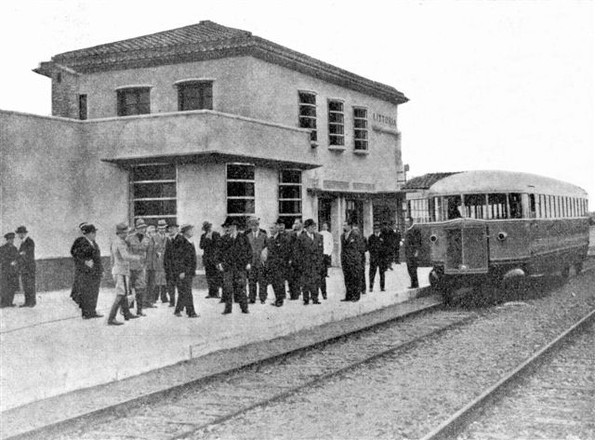 Inaugurazione della stazione di Littoria (26 novembre 1932) - automotrice FS ALb 48